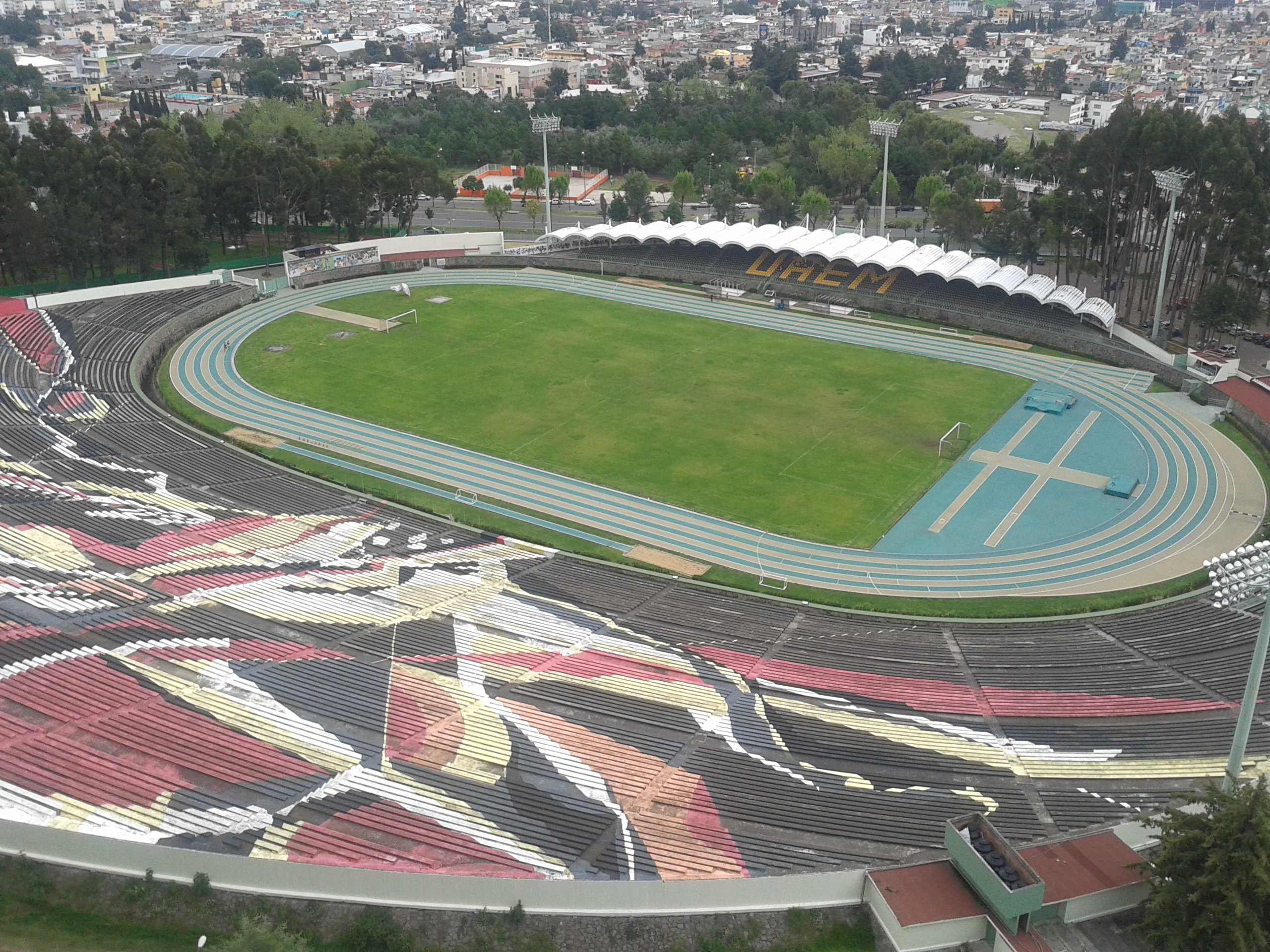 Vista panorámica del estadio desde el mirador del cerro de Coatepec